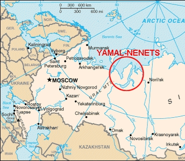 landafræði